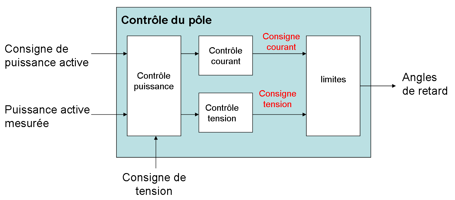 schéma de contrôle d'un HVDC LCC